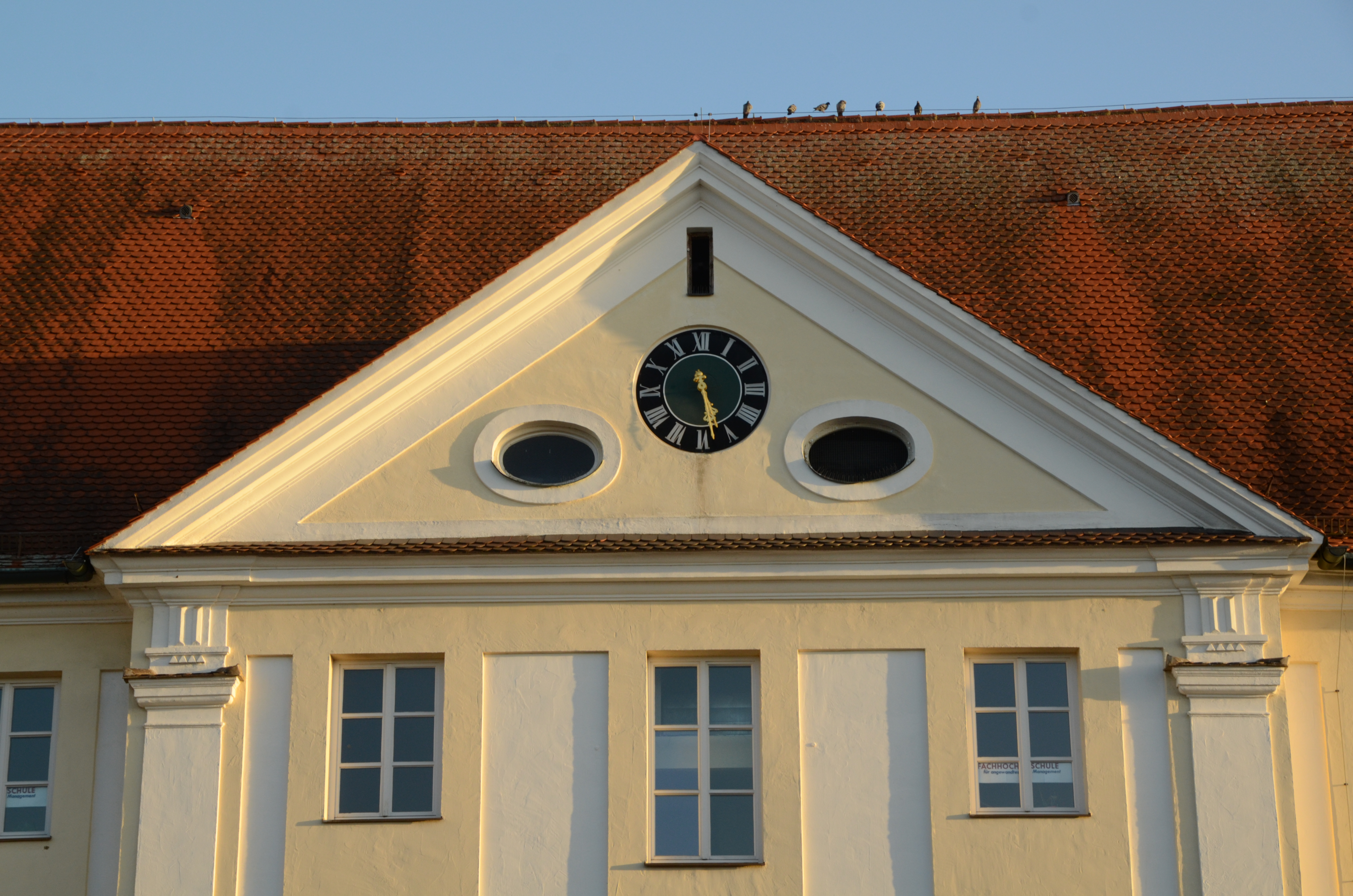 Günzburg, ehealige. Österreichische Kaserne